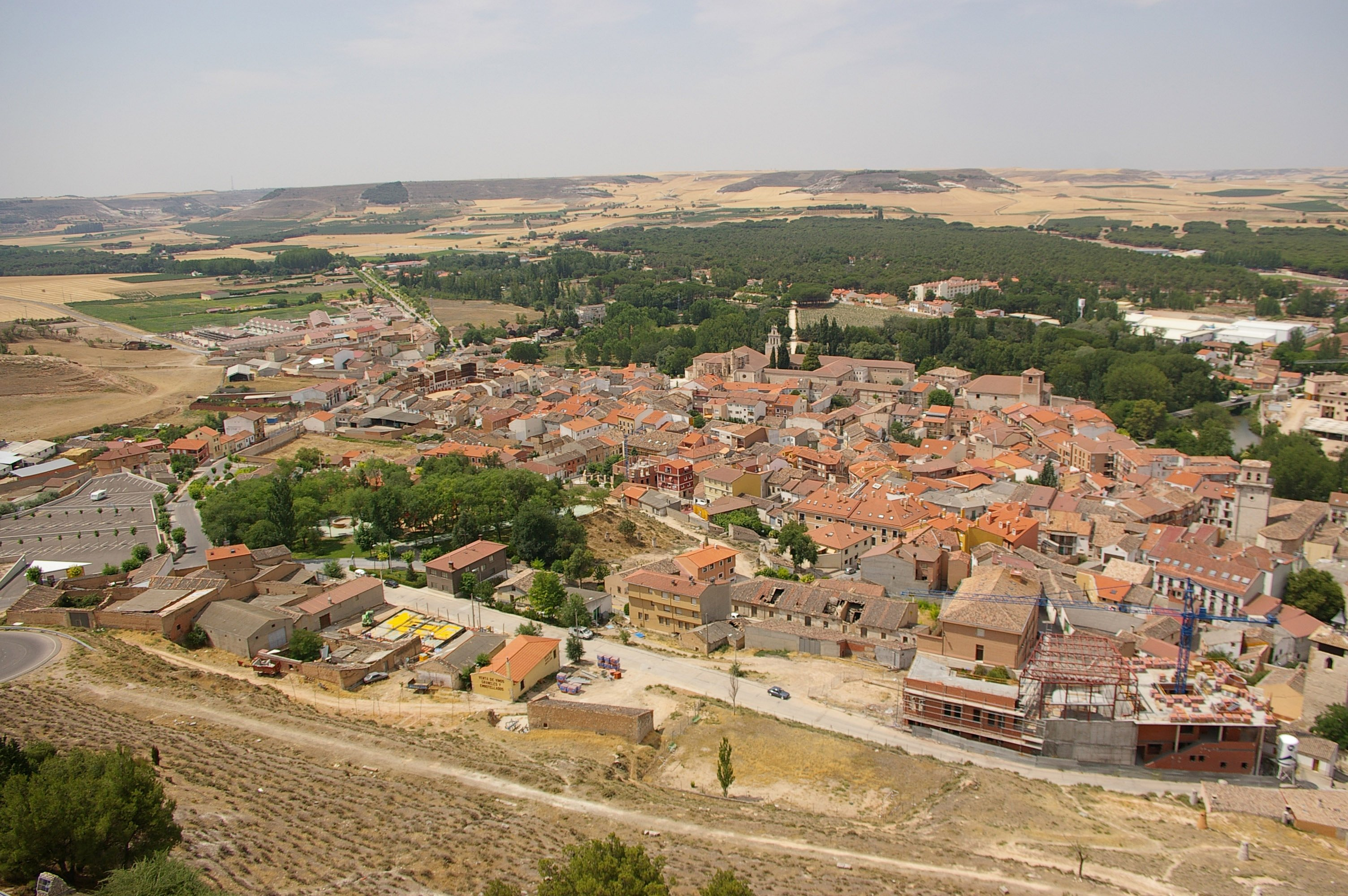 Vista principal del pueblo de Peñafiel (Valladolid). Main view of the town of Peñafiel.